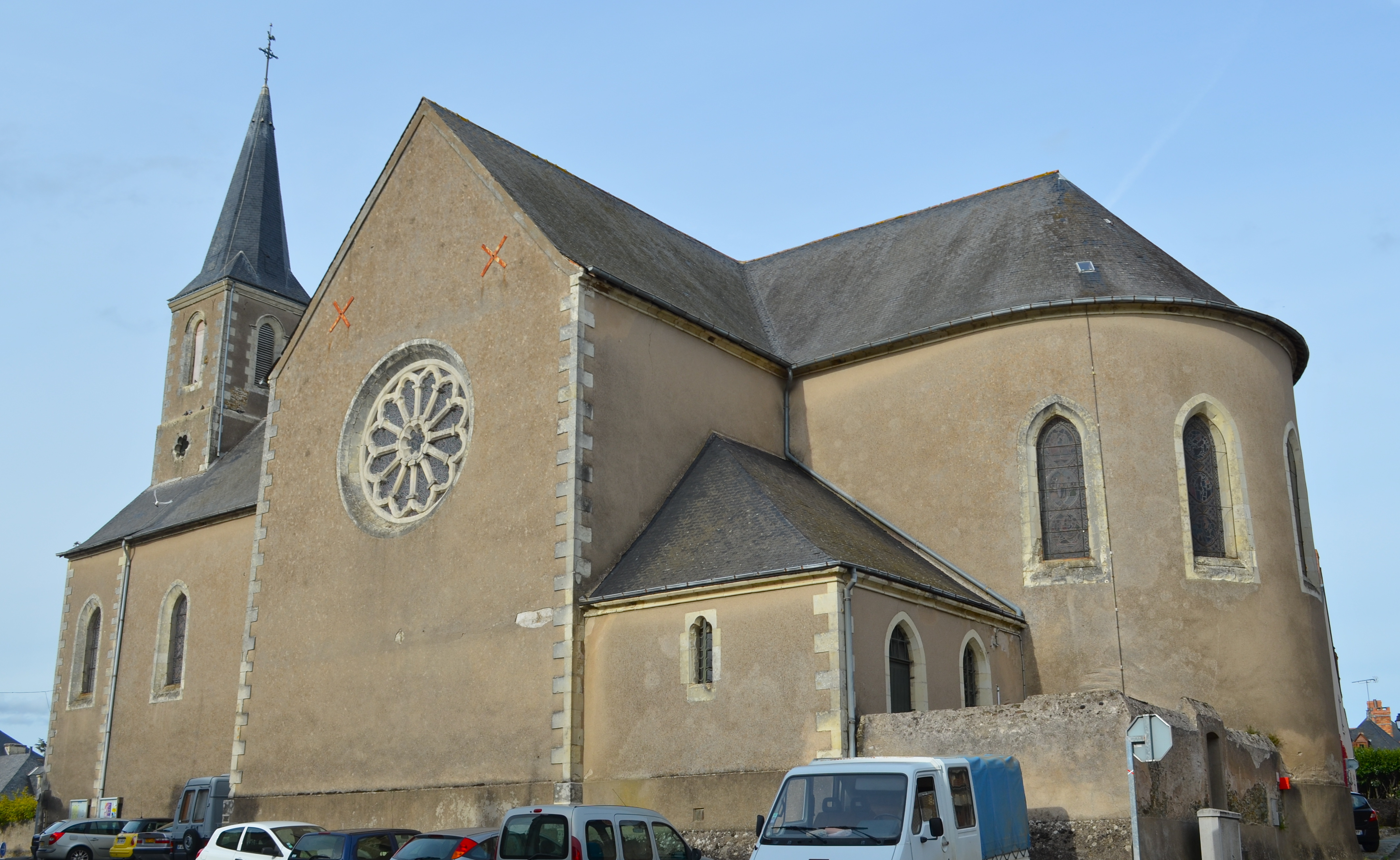 Eglise - Beaulieu-sur-Layon (Maine-et-Loire)